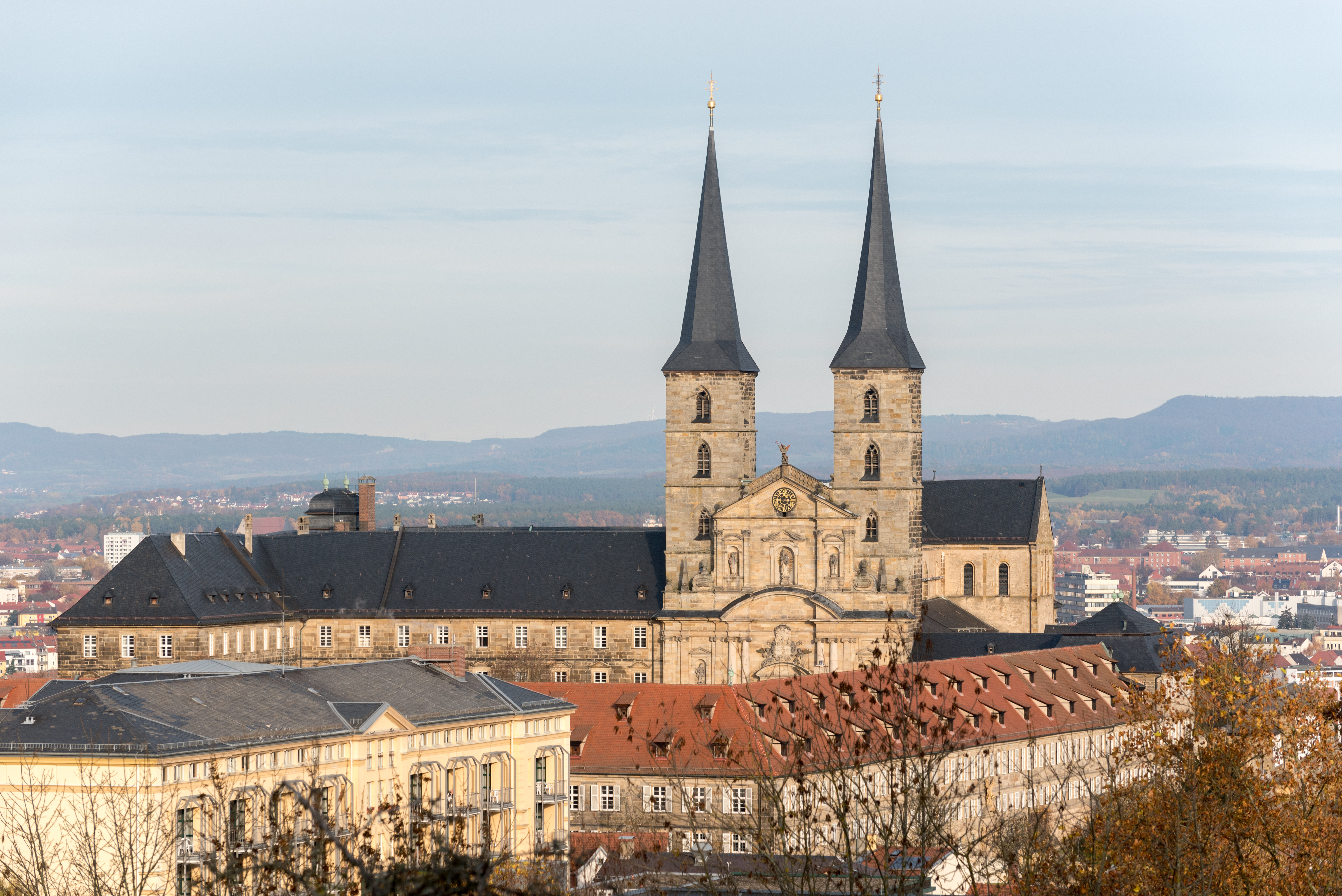 Bamberg, Kloster Michelsberg, von Westen